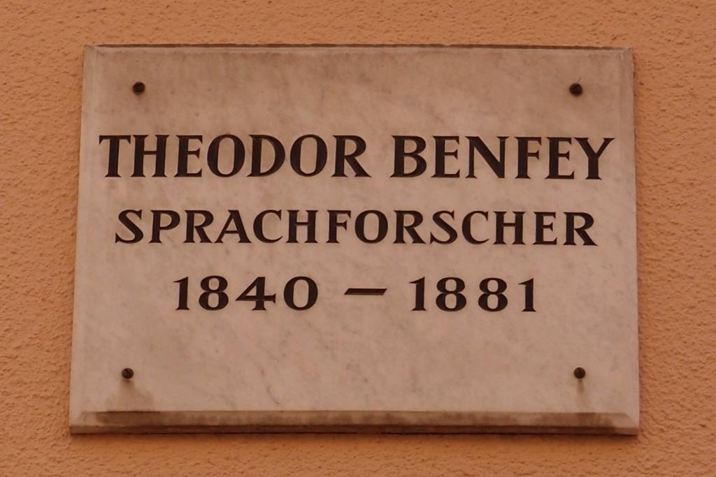 Tafel für den Orientalisten und Sprachforscher Theodor Benfey (1809-1881) in Göttingen, Theaterstraße 5